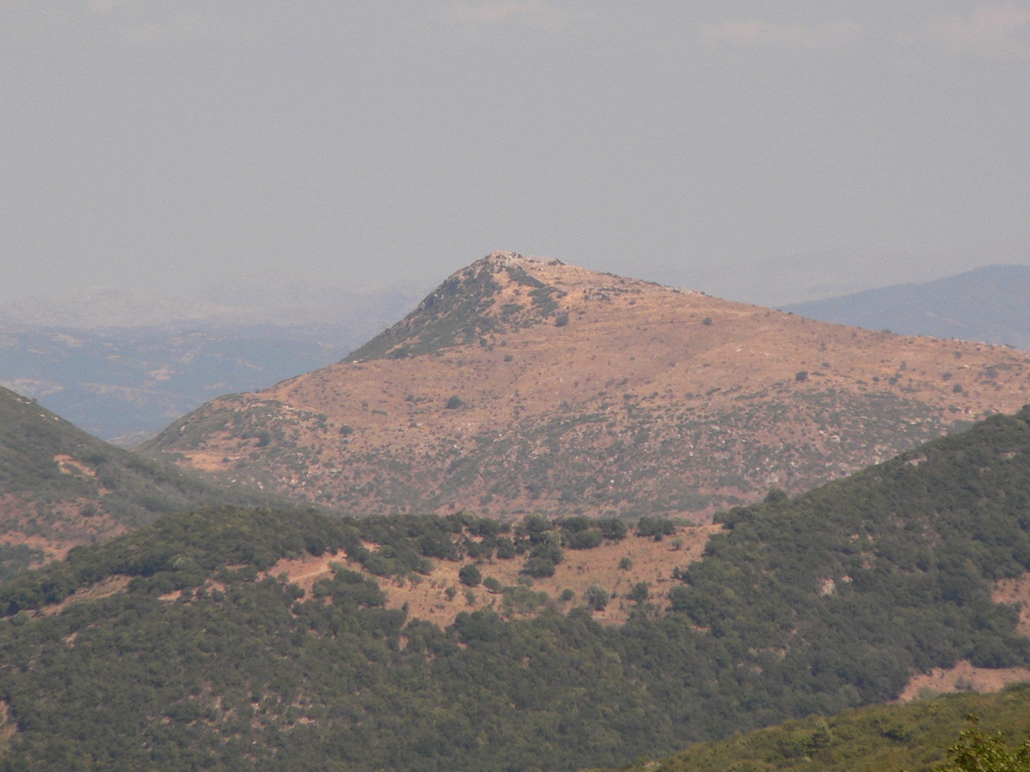 Blick auf Theisoa vom nördlich gelegenen Alipheira.